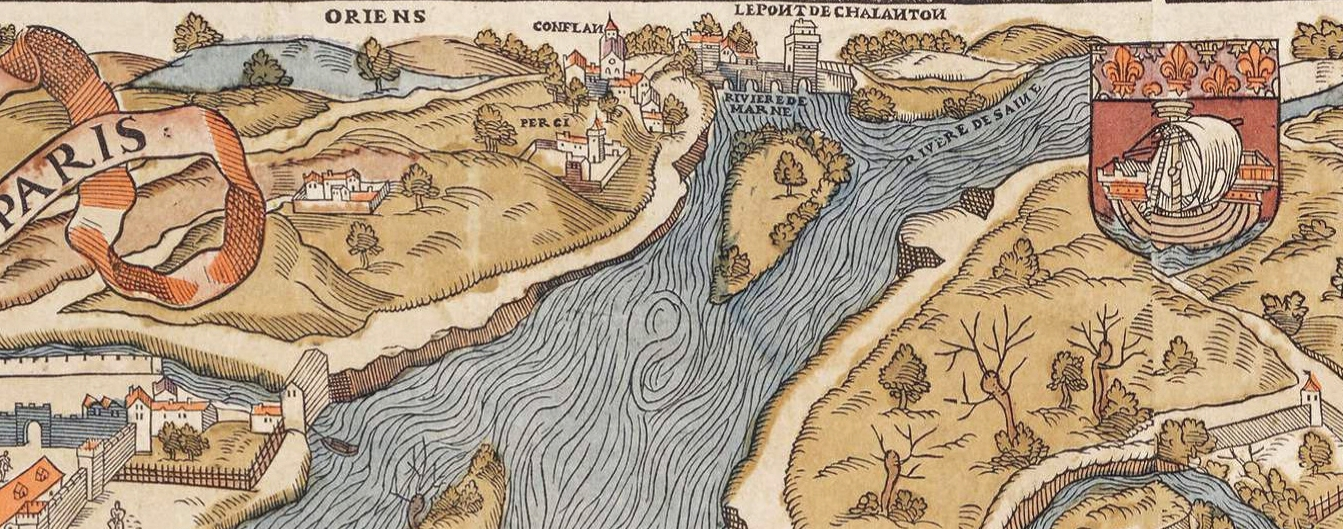 Bercy sur le planTruschet et Hoyau dit plan de Bâle